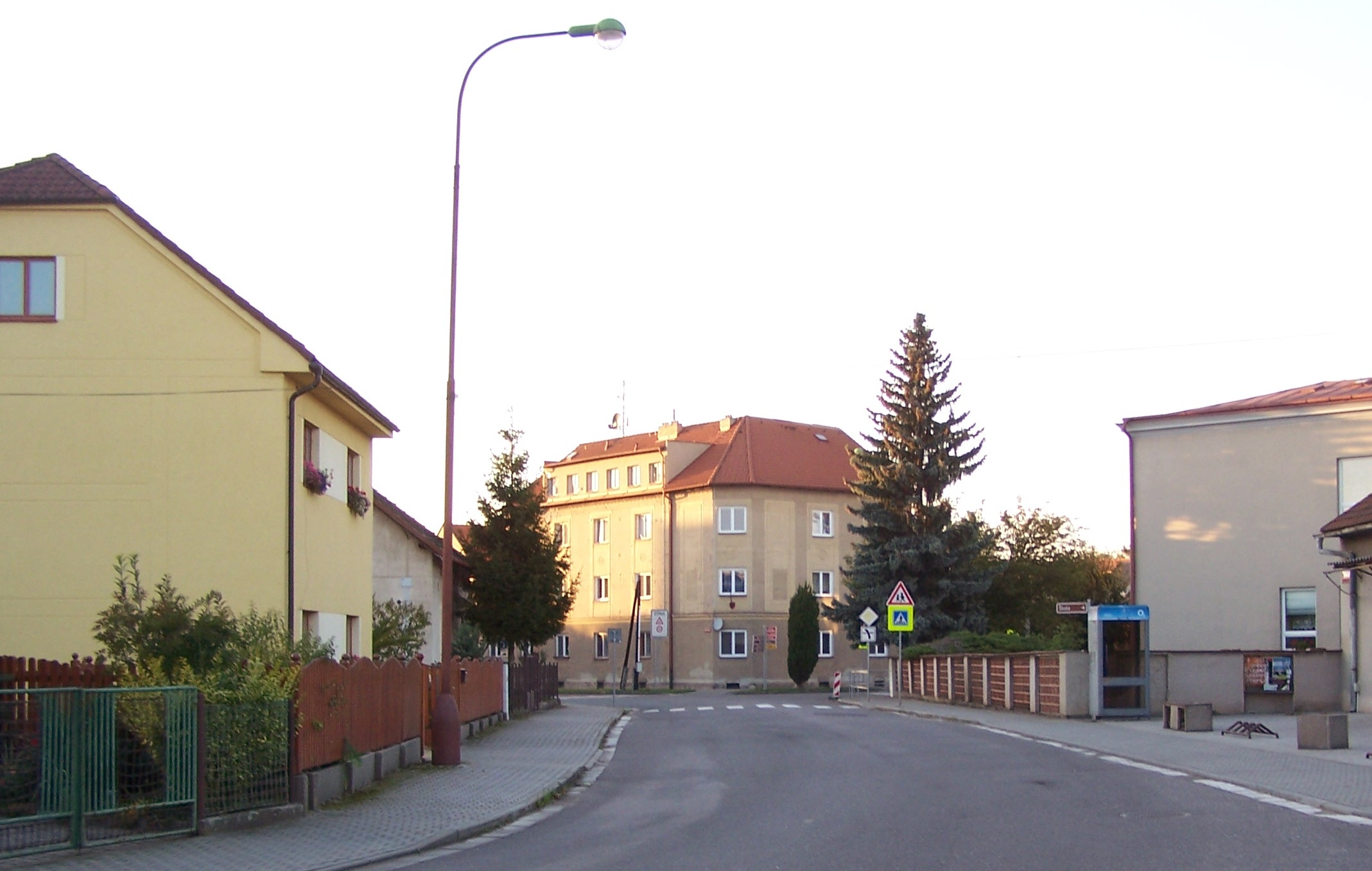 Černožice, Sehnoutkova ulice